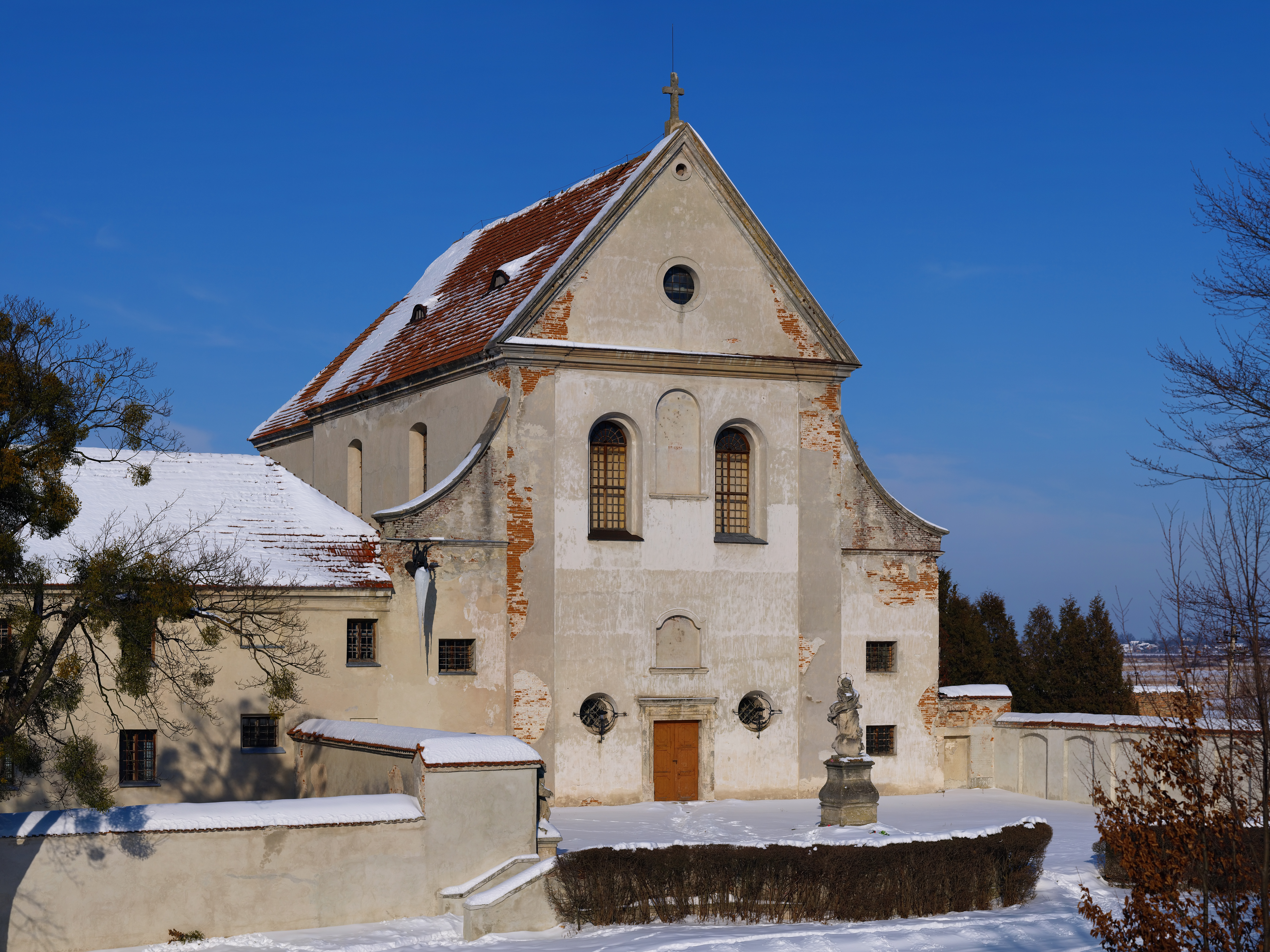 Колишній монастир Капуцинів (The former Capuchin monastery)